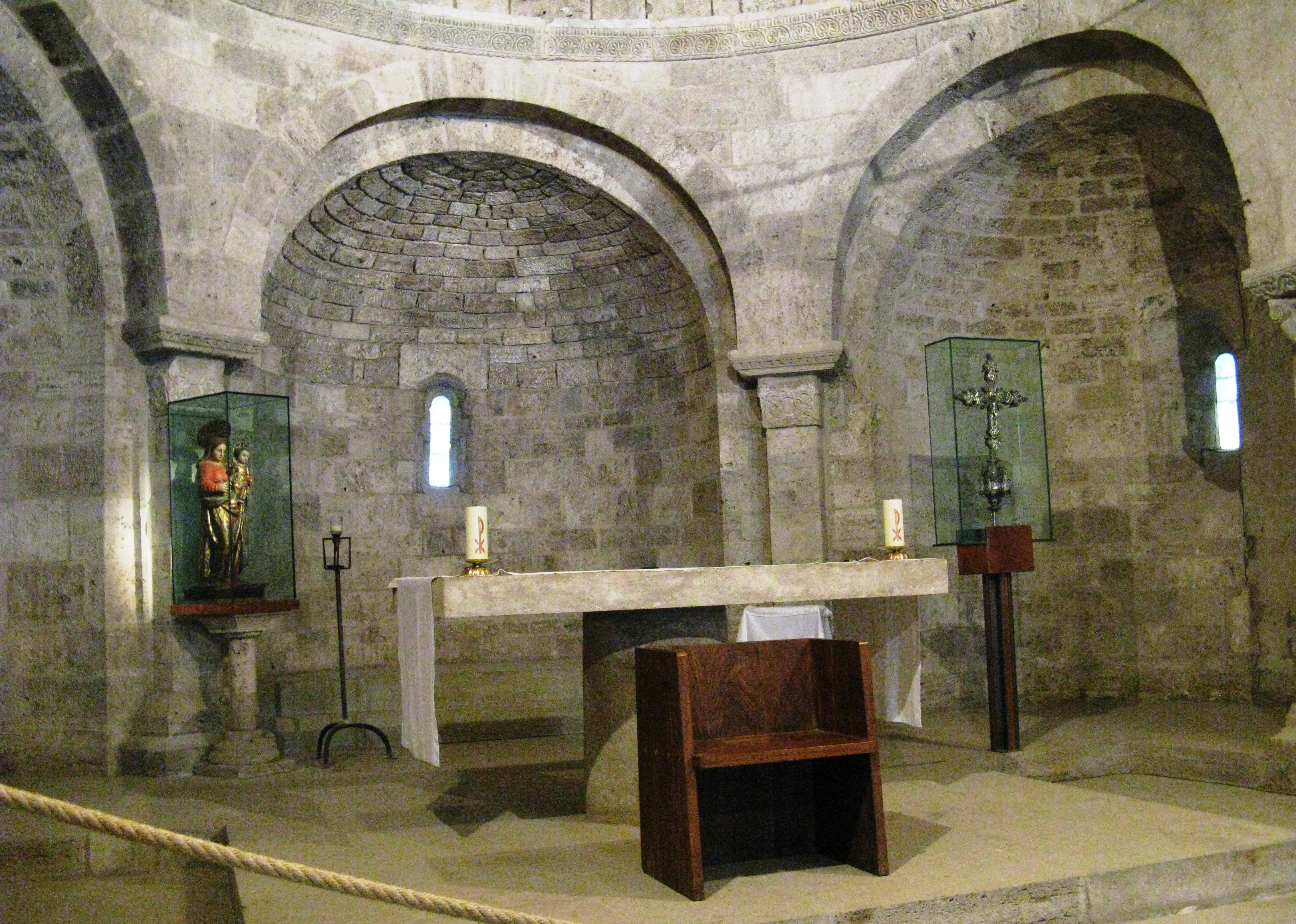 Romanische Kirche Santa Maria de Porqueres, Apsis und Altar